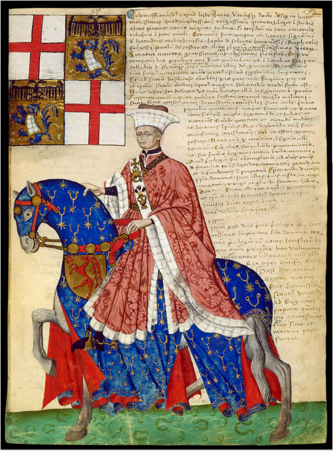 Giovan Francesco Capodilista in "De viris illustribus familiae Transelgardorum Forzaté et Capitislistae"